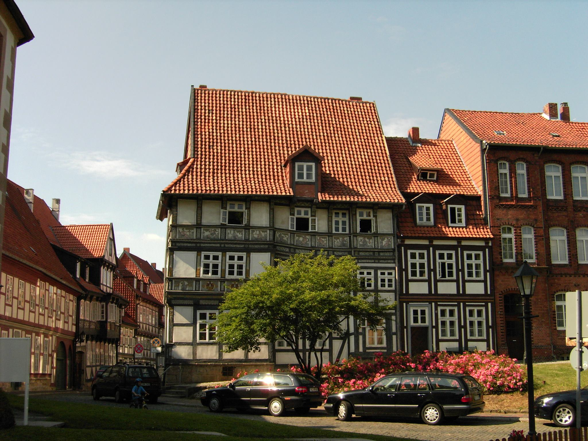 Hildesheim, Timber frame house, Hinterer Brühl, Wernersches Haus mit alter Farbfassade.